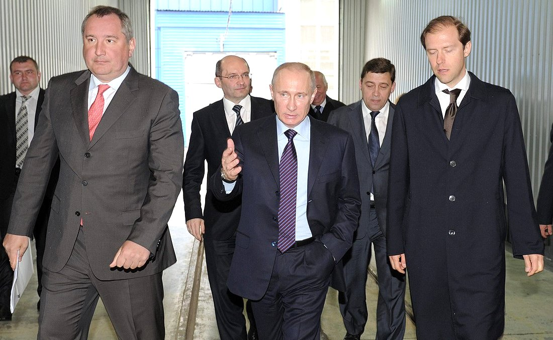 Посещение Владимиром Путиным НПК «Уралвагонзавод»